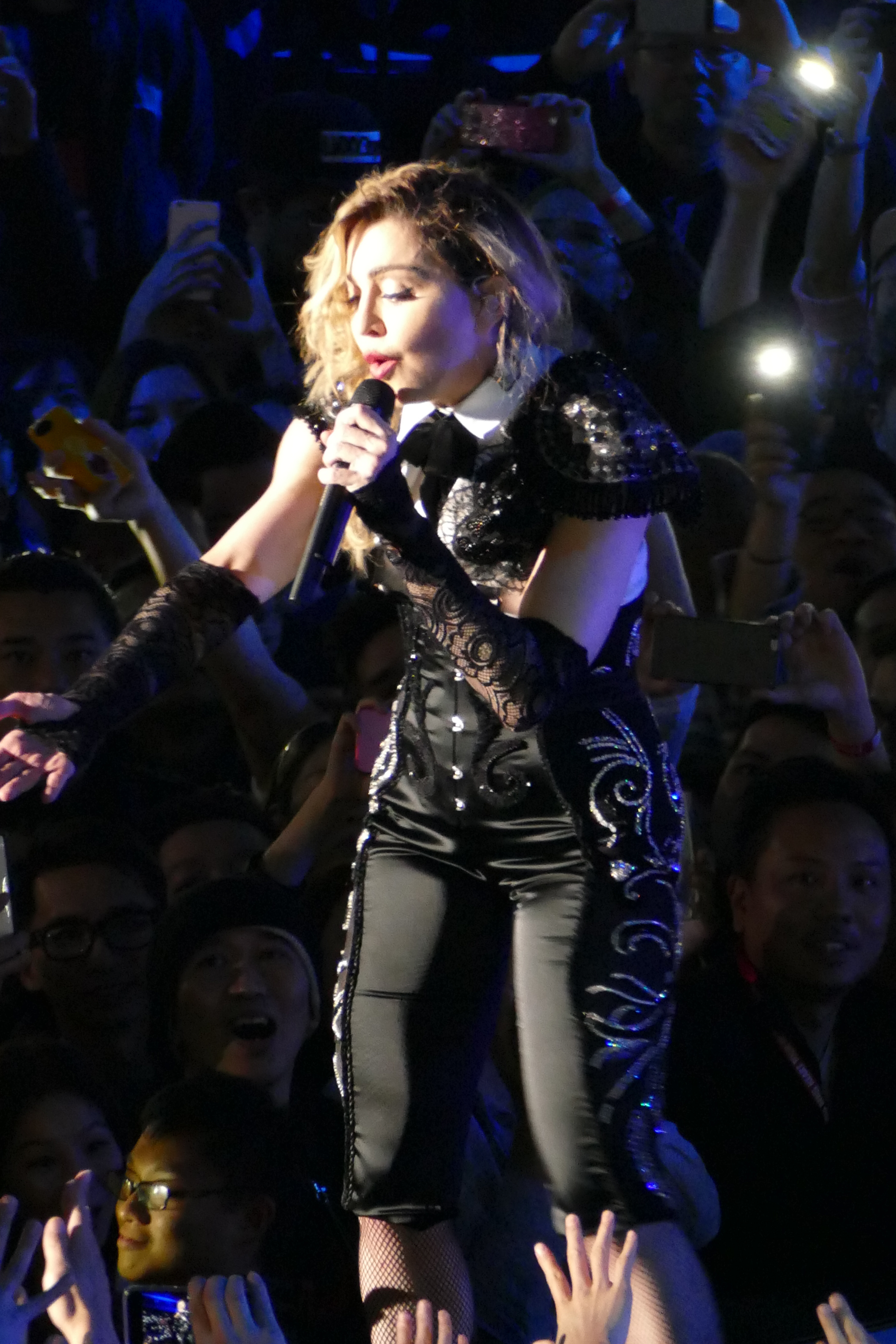 taipei_madonna_concert-240